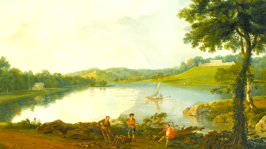 Gatton Park